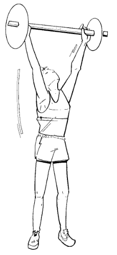 Musculation exercice arraché 3.png